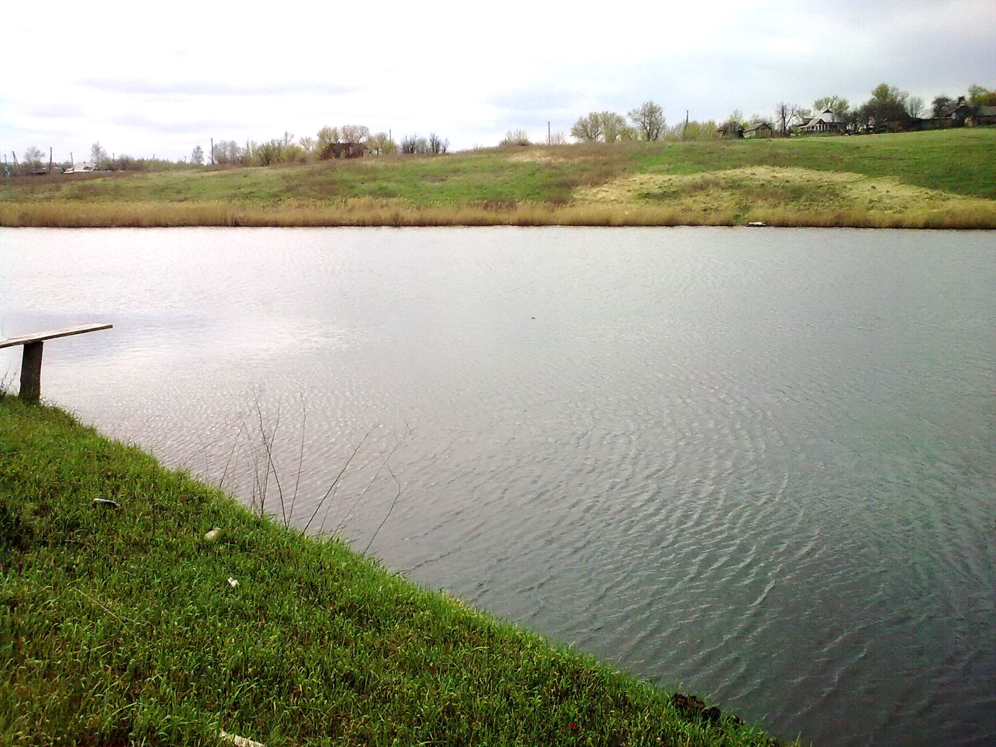 Место летнего отдыха